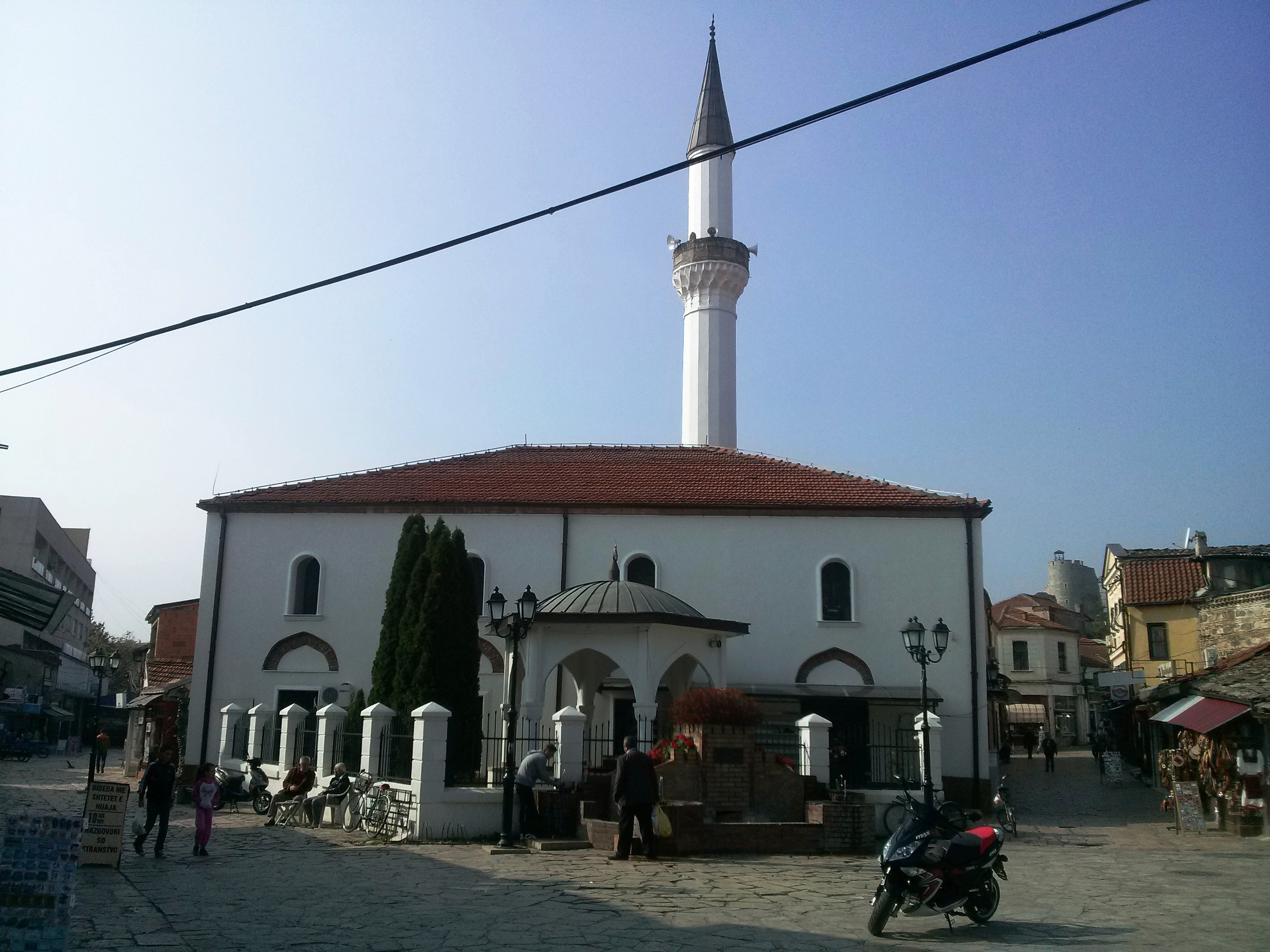 Целосен поглед кон џамијата „Мурат Паша“, Скопје